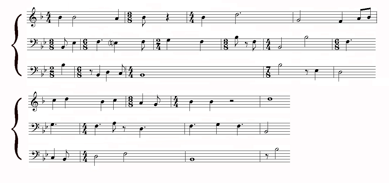 Trecho de abertura da balada Fuions de ci